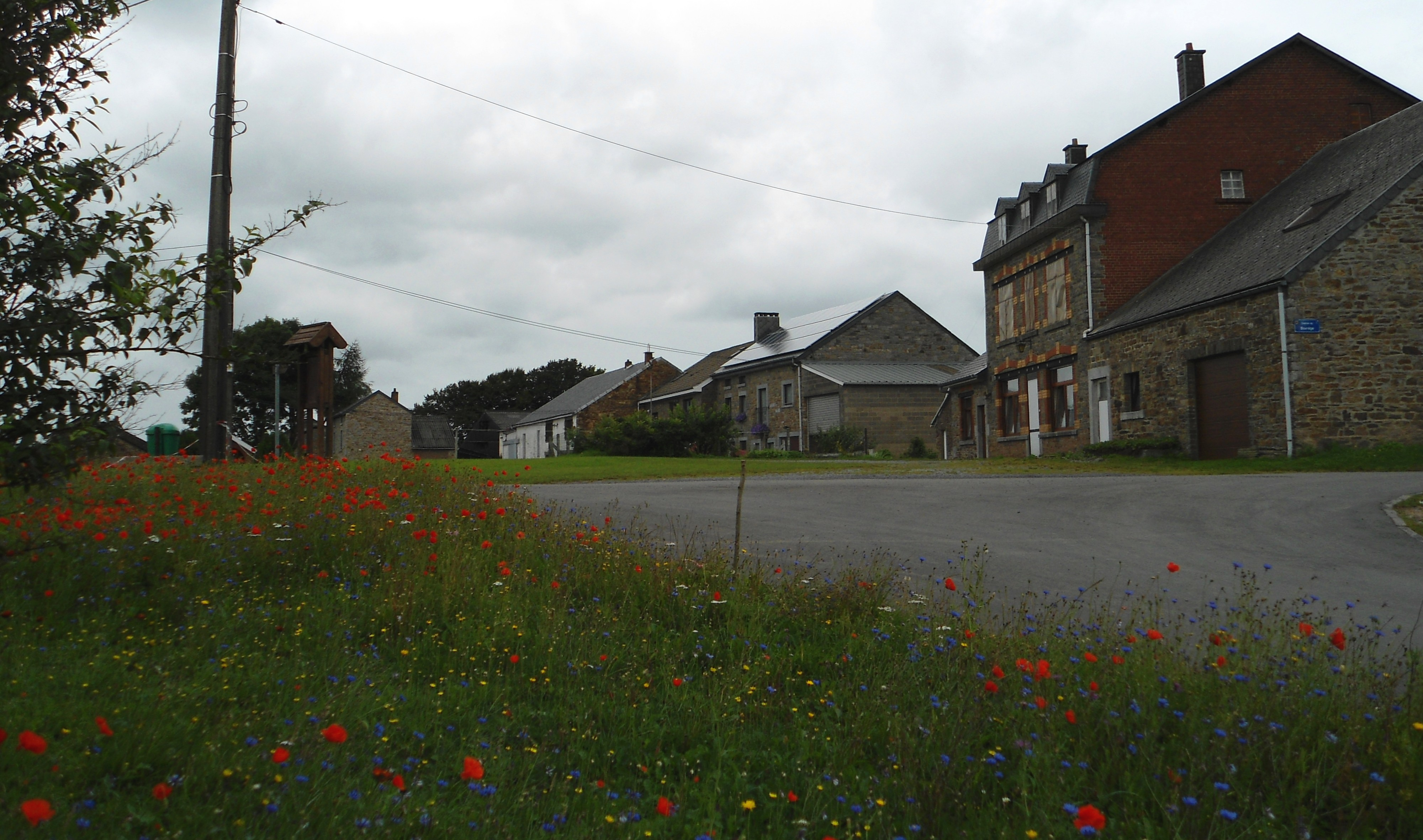 Werbomont : Place du Capitaine Lespagnard